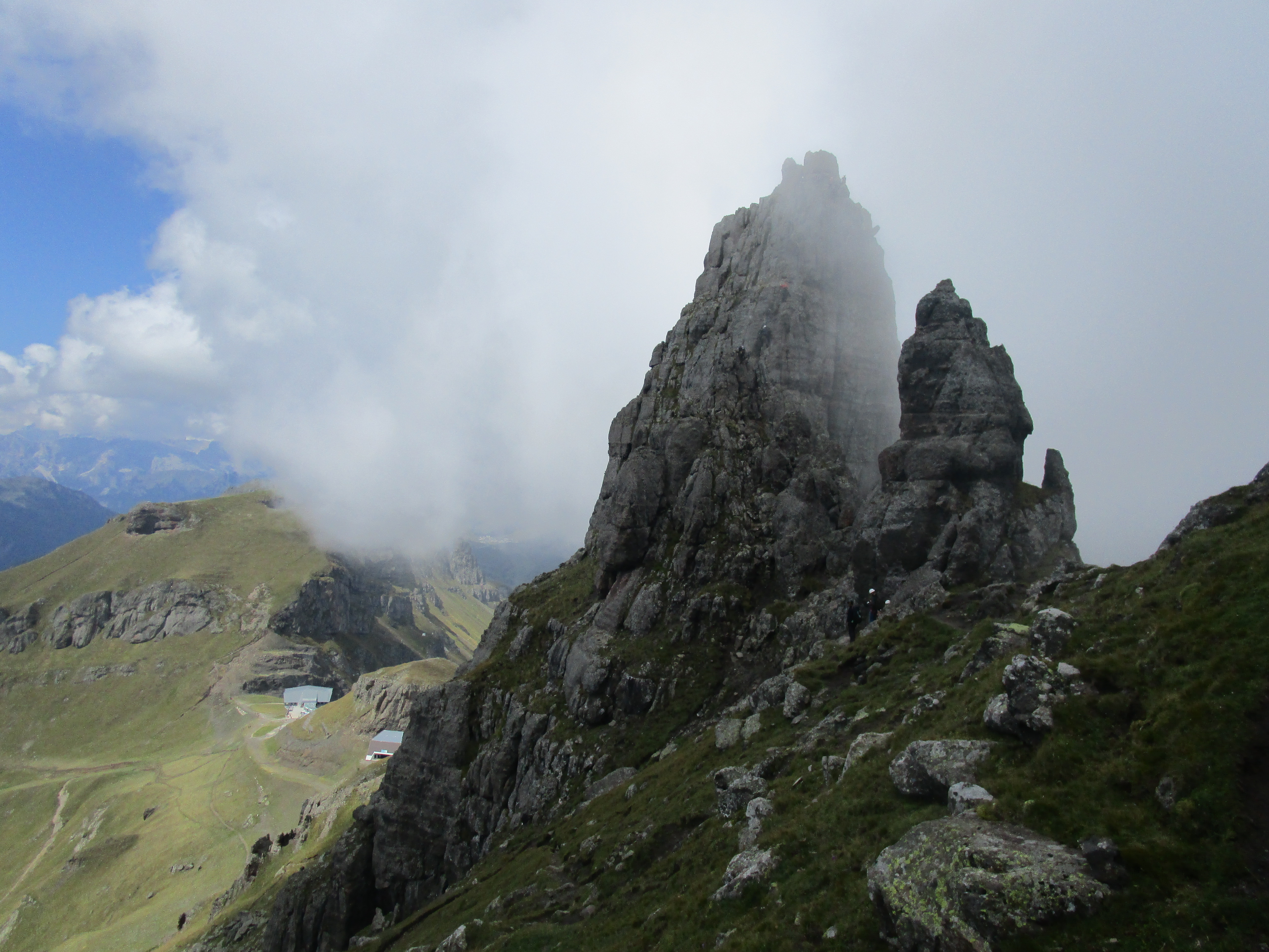 La Mesola von Osten